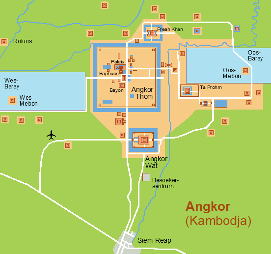 'n Kaart van die Angkor-streek.